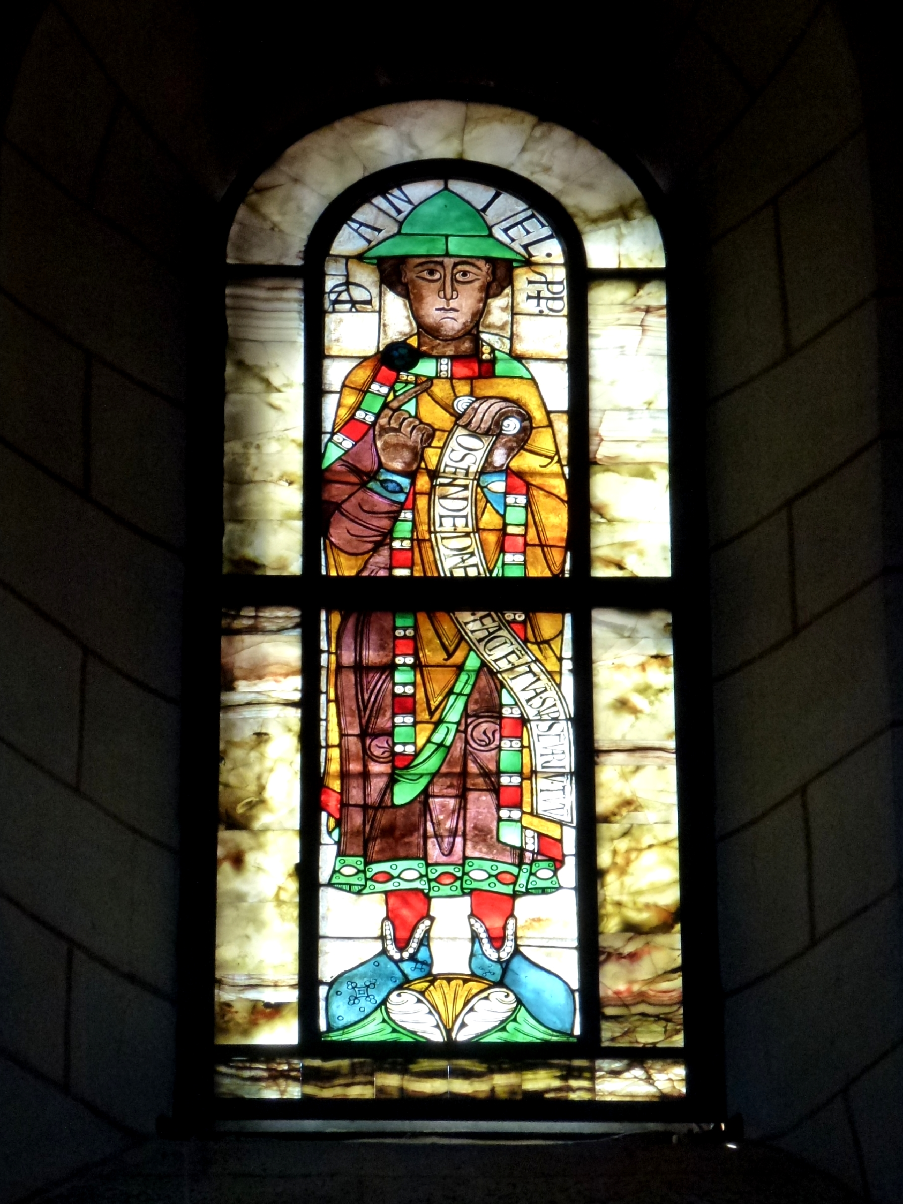 Hohe Dom Augsburg Germany